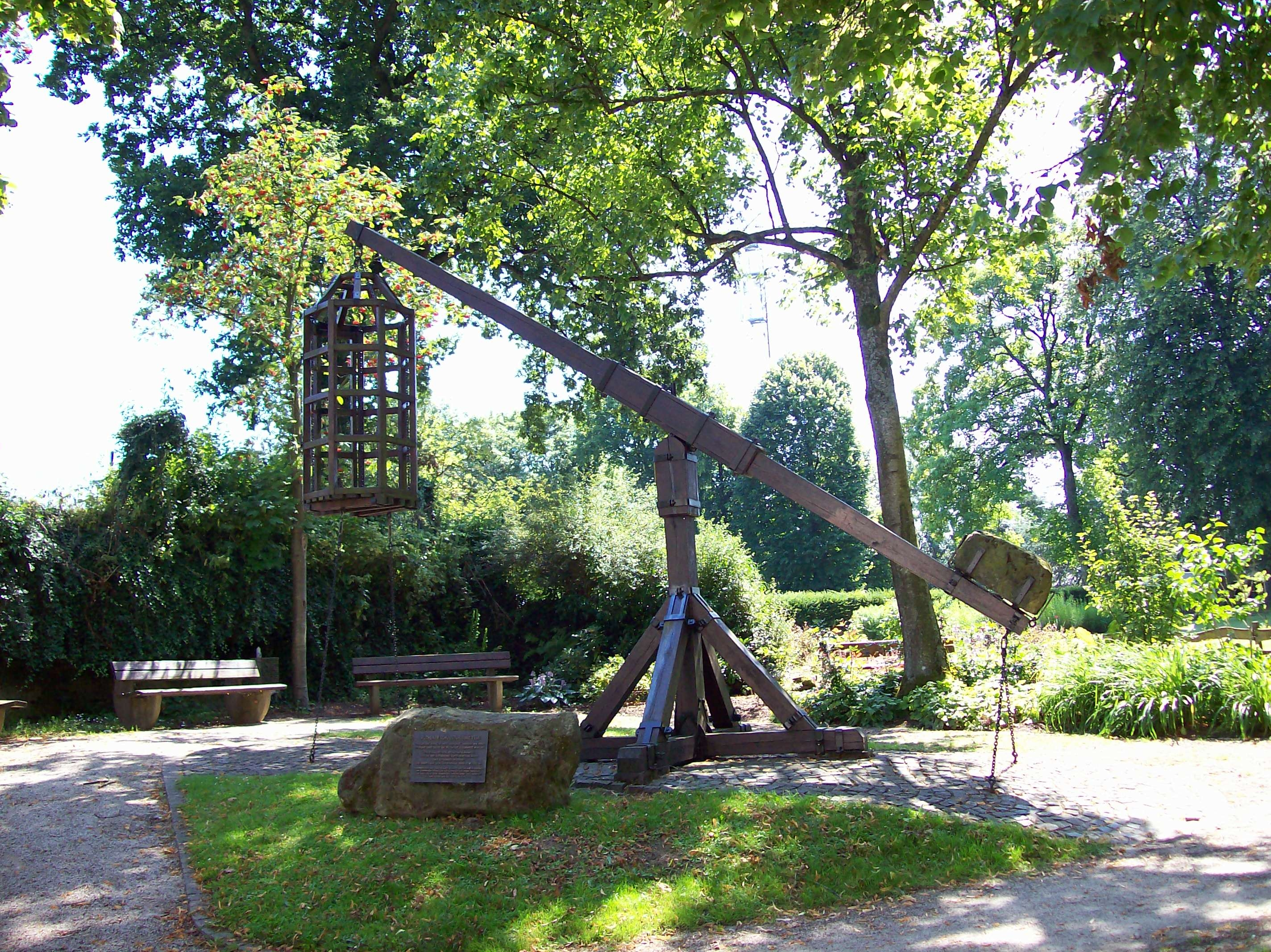 Schubstuhl (auch Schandkorb oder -käfig) in Rüthen, Wappen (Germany)